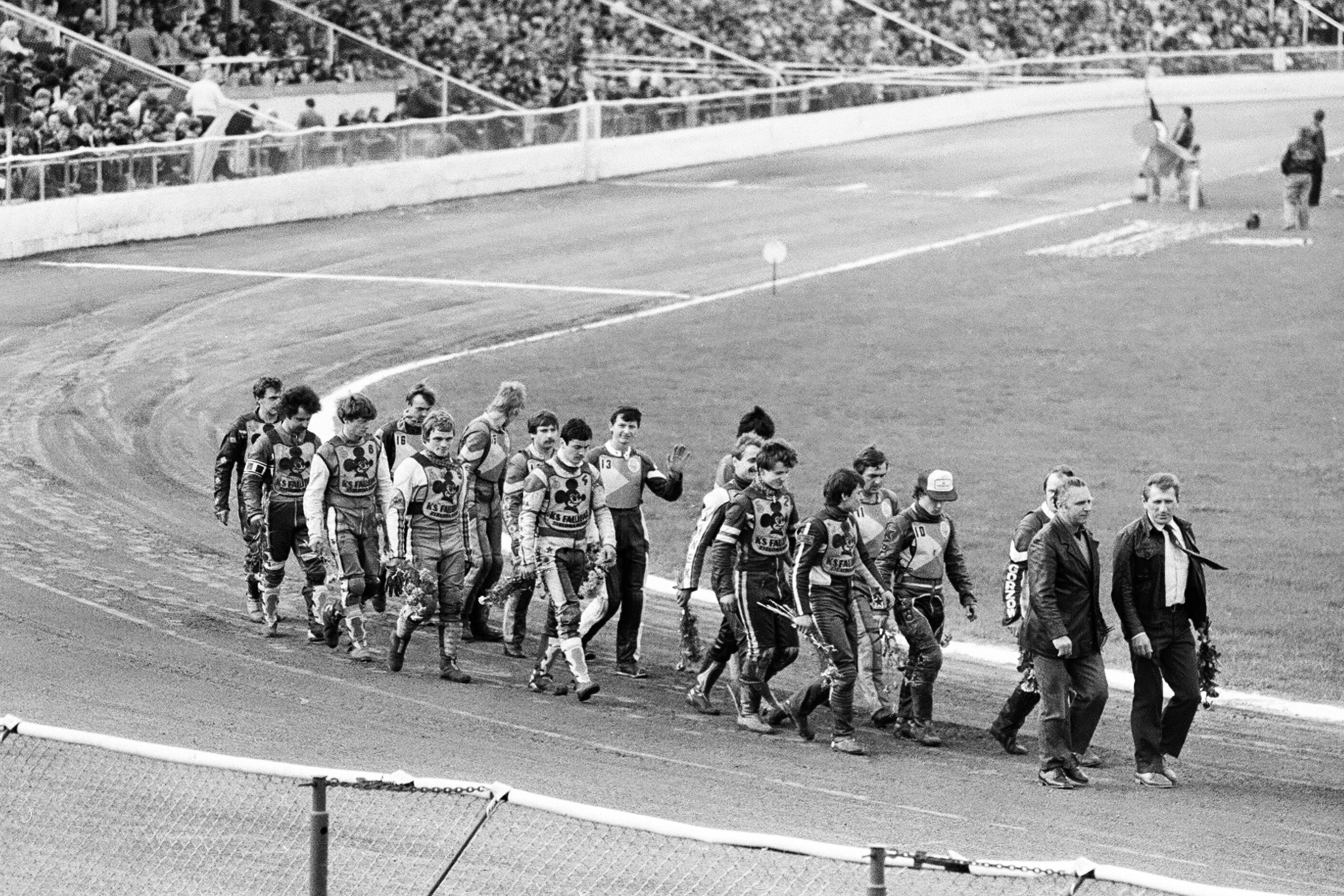 7.10.1984 r. - Gorzów Wlkp., Derby Ziemi Lubuskiej nr 32. Zawodnicy po prezentacji wracają do parku maszyn. Prowadzą ich prezes Falubazu (?) i kierownik Stali Jerzy Szabłowski (zm. 2011 r.). Falubaz w składzie: 1. M. Jaworek, 2. R. Jasinowski, 3. J. Krzystyniak, 4. W. Pawlak (zm.1987 r.), 5. A. Huszcza, 6. P. Tomaszewski, 7. S. Żeromski (zm.2004 r.), 8. J. Glinka; Stal w składzie: 9. J. Rembas (zasłonięty), 10. M. Daniszewski, 11. M. Woźniak, 12. R. Franczyszyn (zasłonięty), 13. B. Nowak, 14. S. Racięda, 15. C. Owiżyc (z odwróconą głową), 16. J. Gała